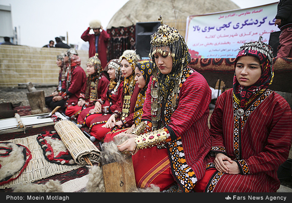 زنان ترکمن در جشنواره اقوام گرگان